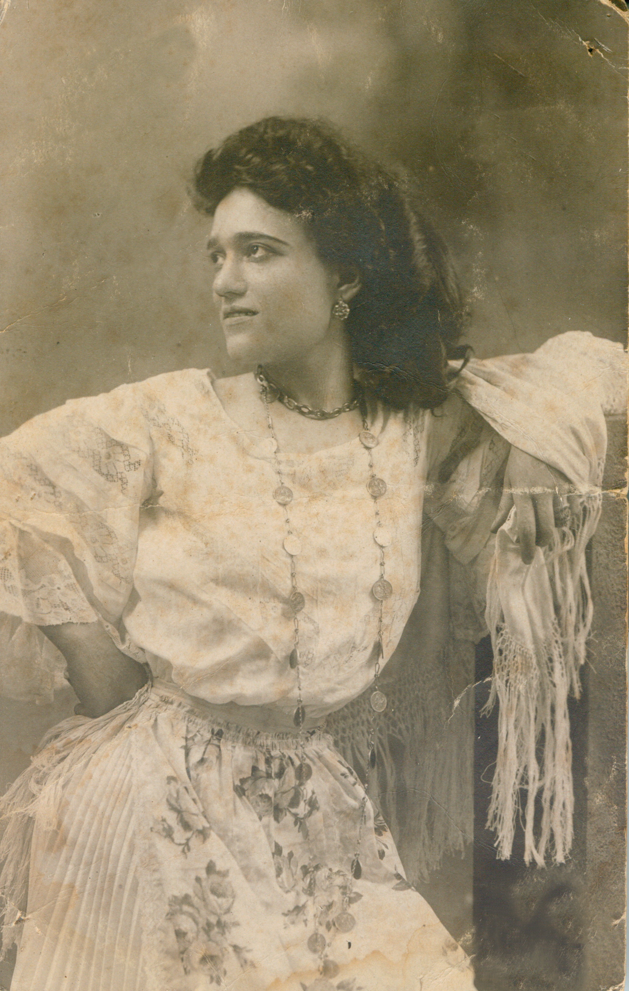 fotografia di mia proprietà di Luisella Viviani nel 1906